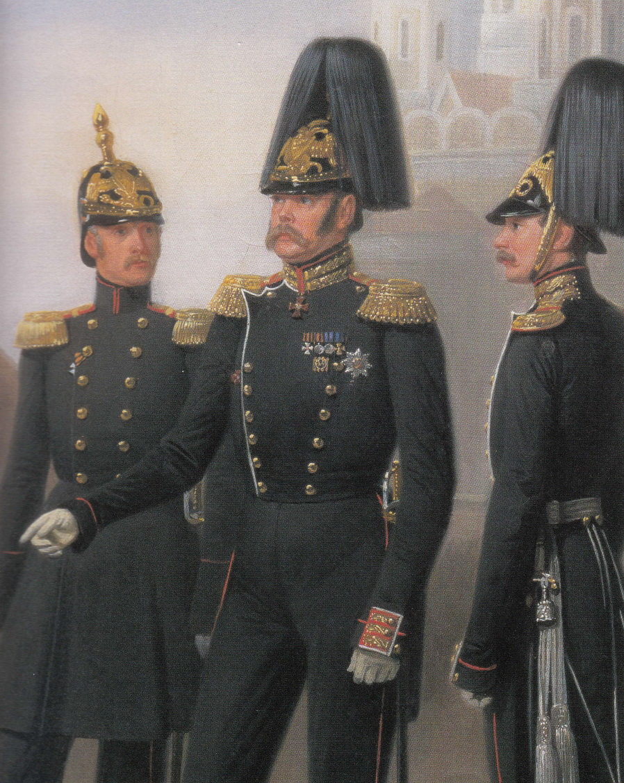 Полковник, генерал и обер-офицер лейб-гвардии Егерского полка в касках обр.1844 года, 1853г.